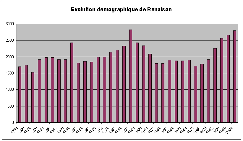 Tableau montrant l'évolution démographique de Renaison (France)